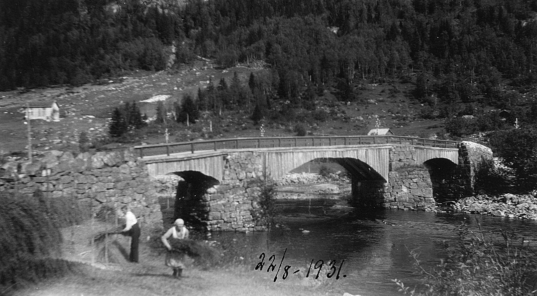 Bru og folk i arbeid i 1931